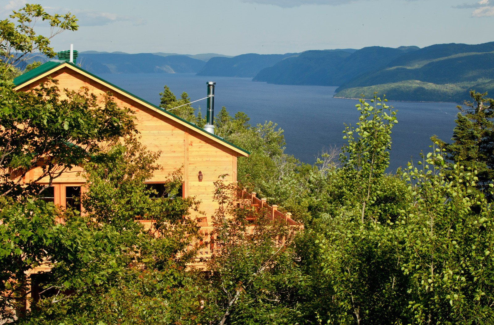 cap au leste - hébergement - chalets - pourvoirie Hospitalité, authenticité, grands espaces, aventure et expérience unique… Le Canada plus grand que nature